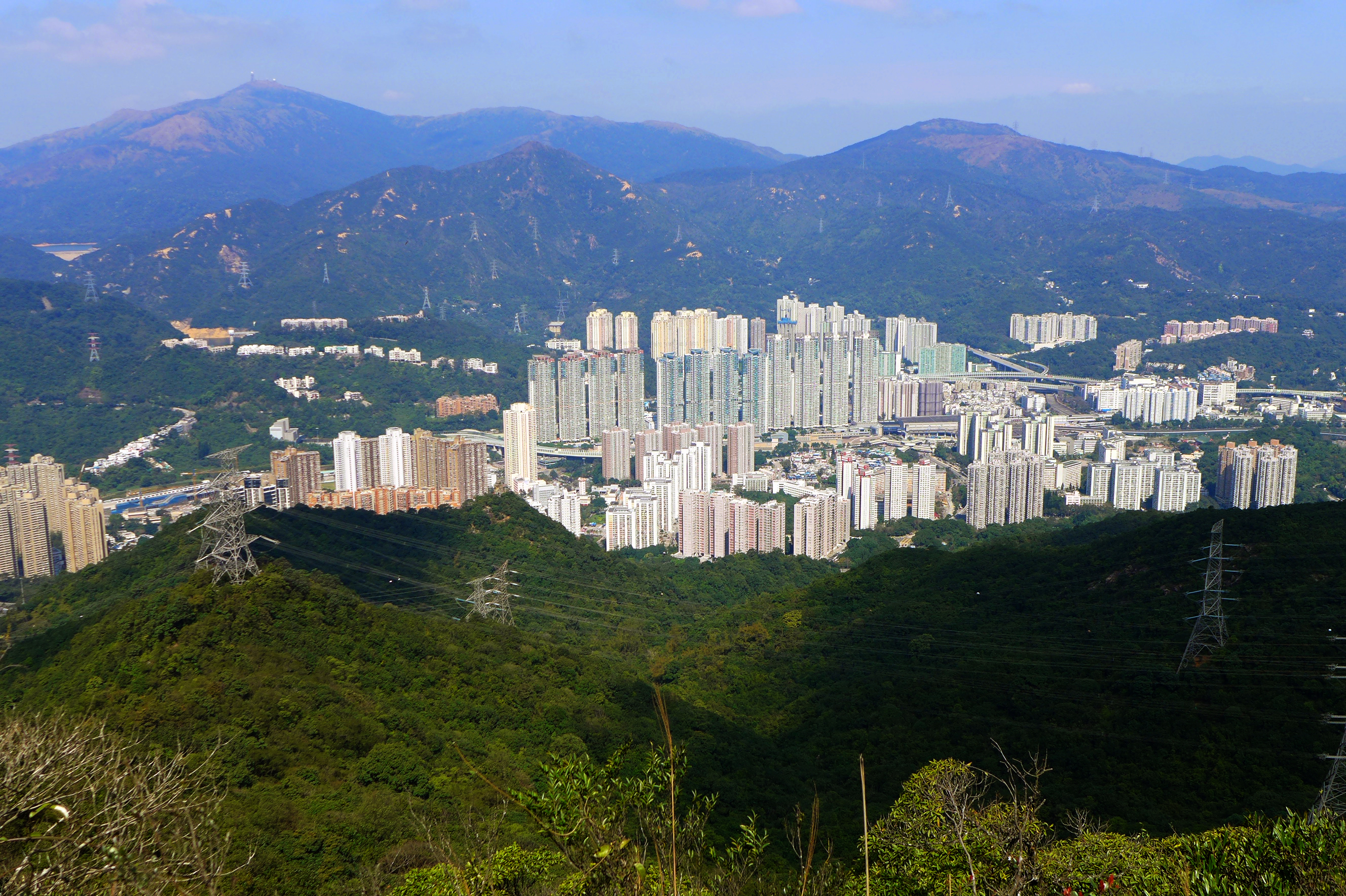 Tai Wai Overview